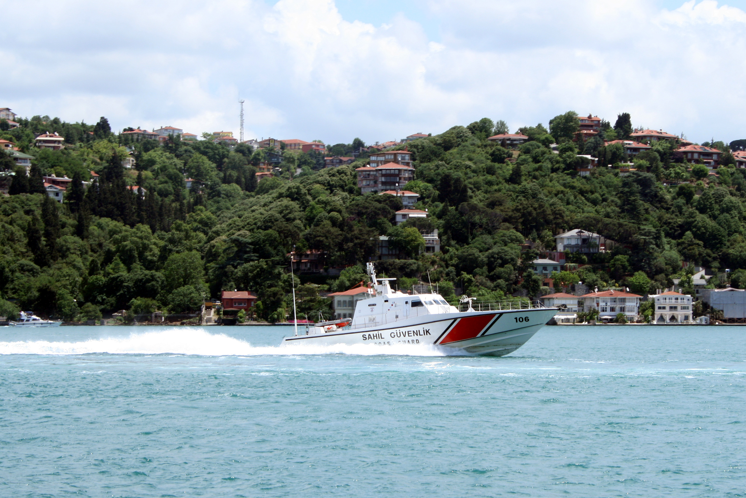 Navire des garde-côtes turcs dans le Bosphore